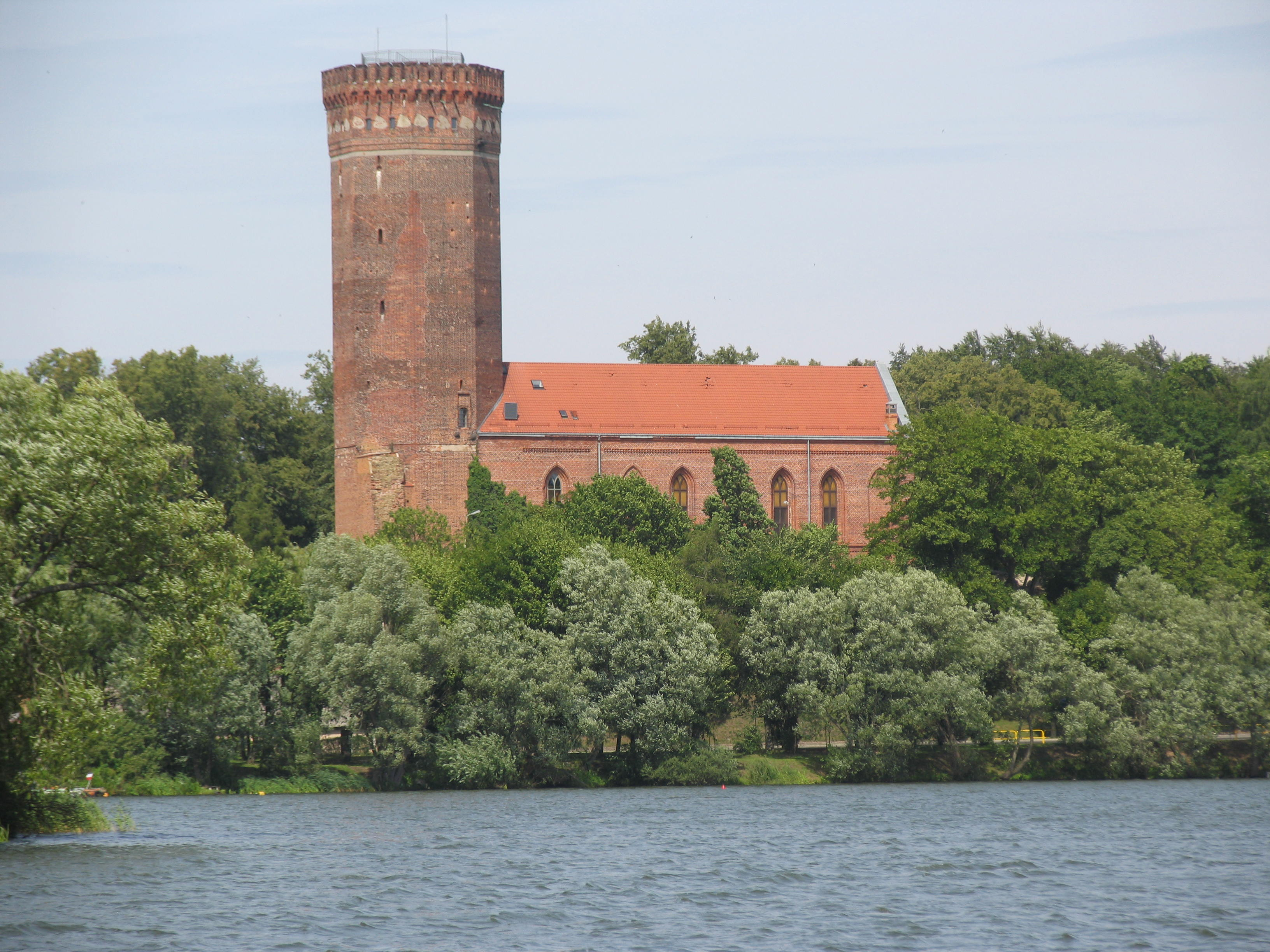 Człuchów, zespół zamku, 1400, 1828